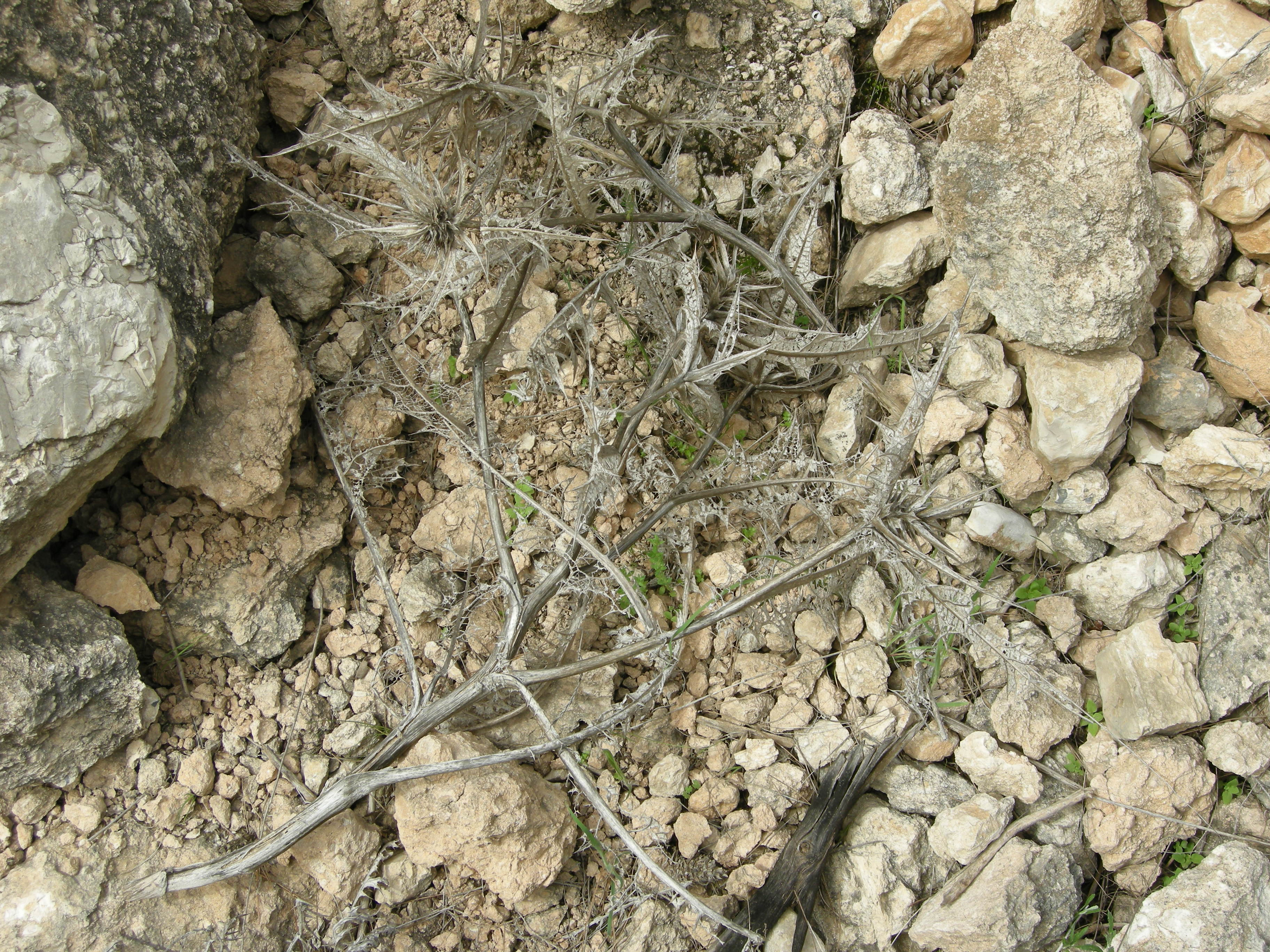 Yaar_yatir15